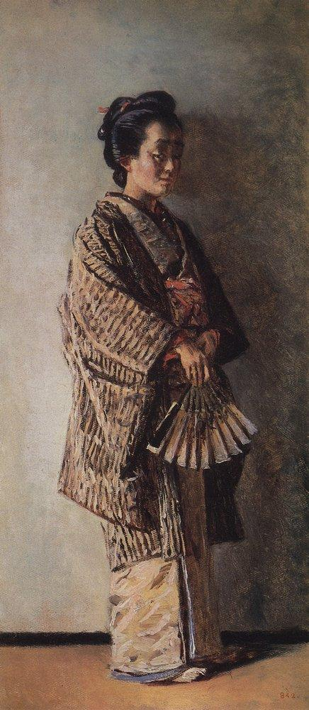 Японка